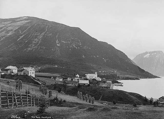 Breim kyrkje (1886- ) på Re i Gloppen